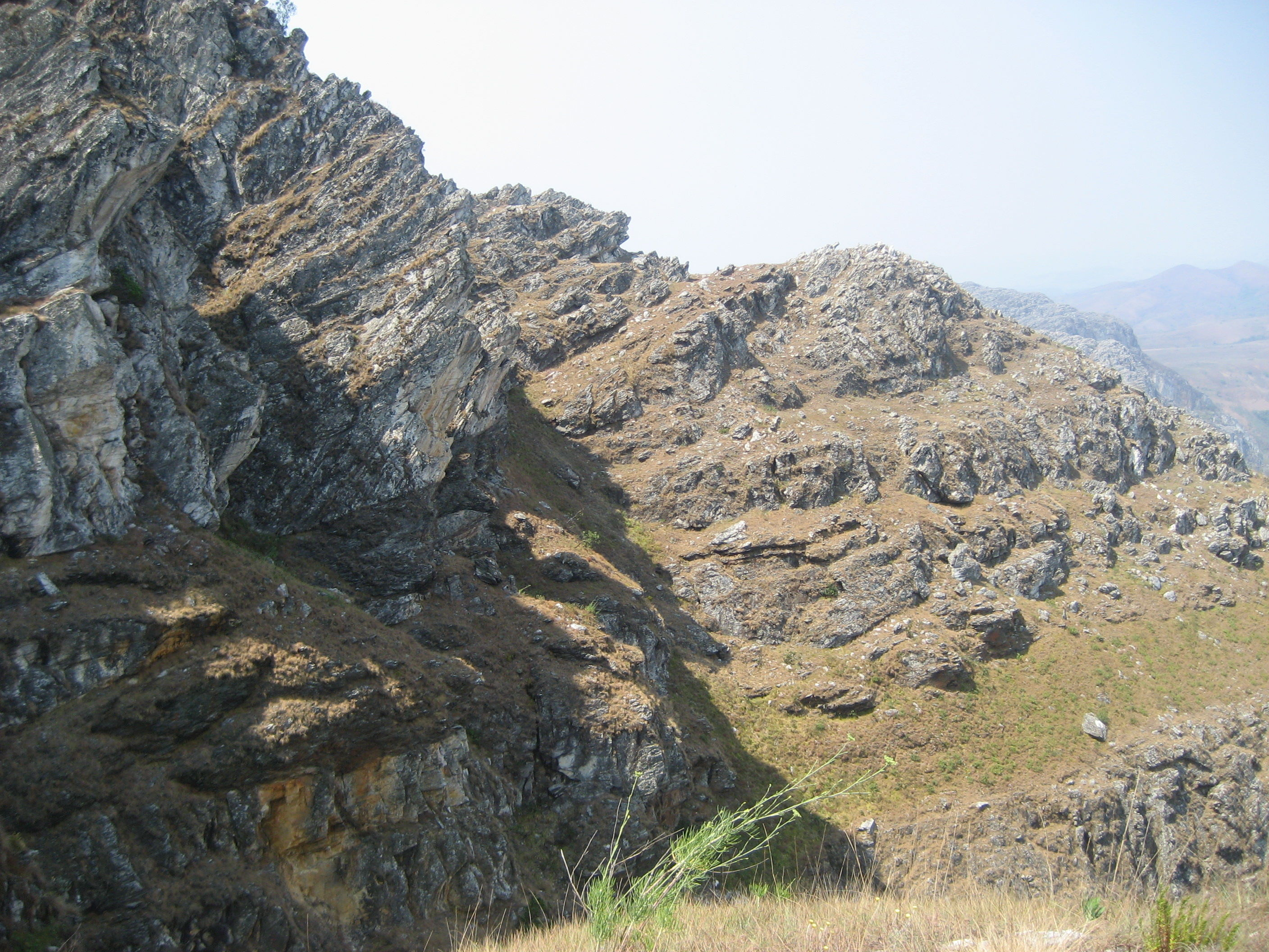 Chimanimani landscape 7